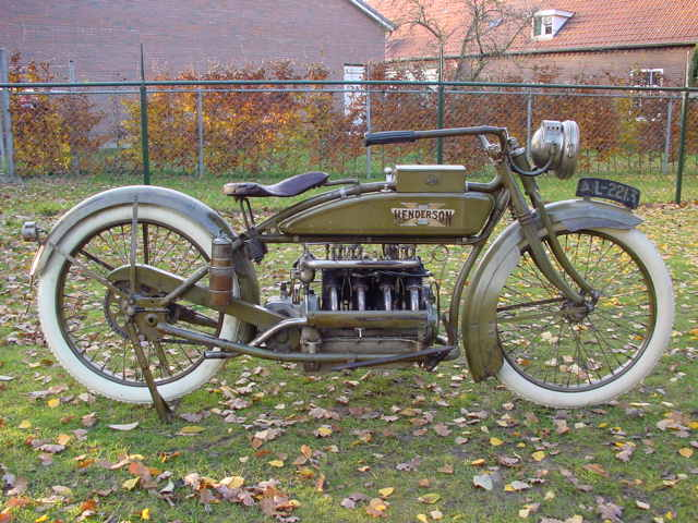 Toestemming van Yesterdays Antique Motorcycles ( Categorie:Afbeelding motorfiets